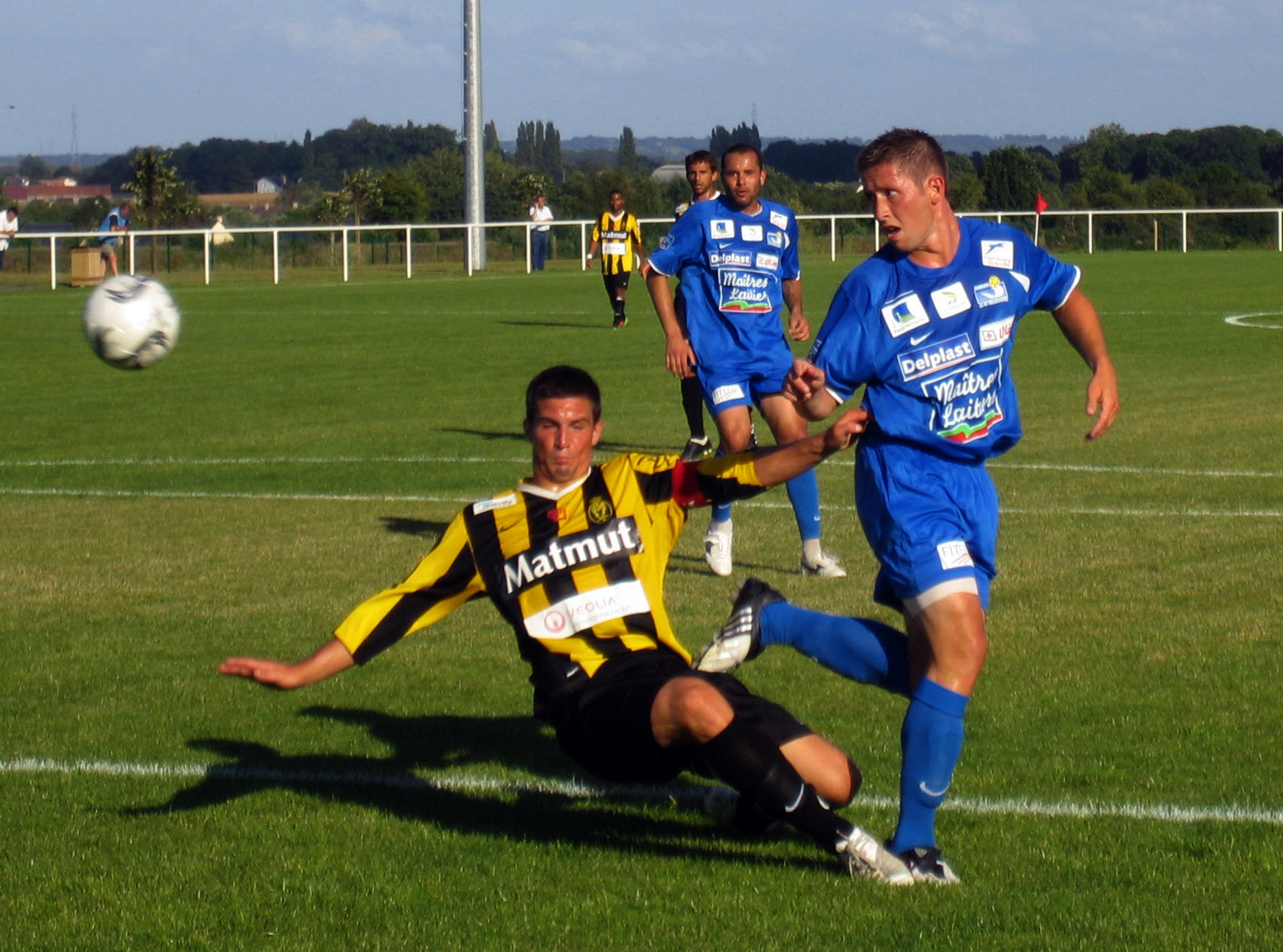 Match US Quevilly-AS Cherbourg. Victor Lecacheux au premier plan (en bleu). Carlos Miranda Jr au second plan.